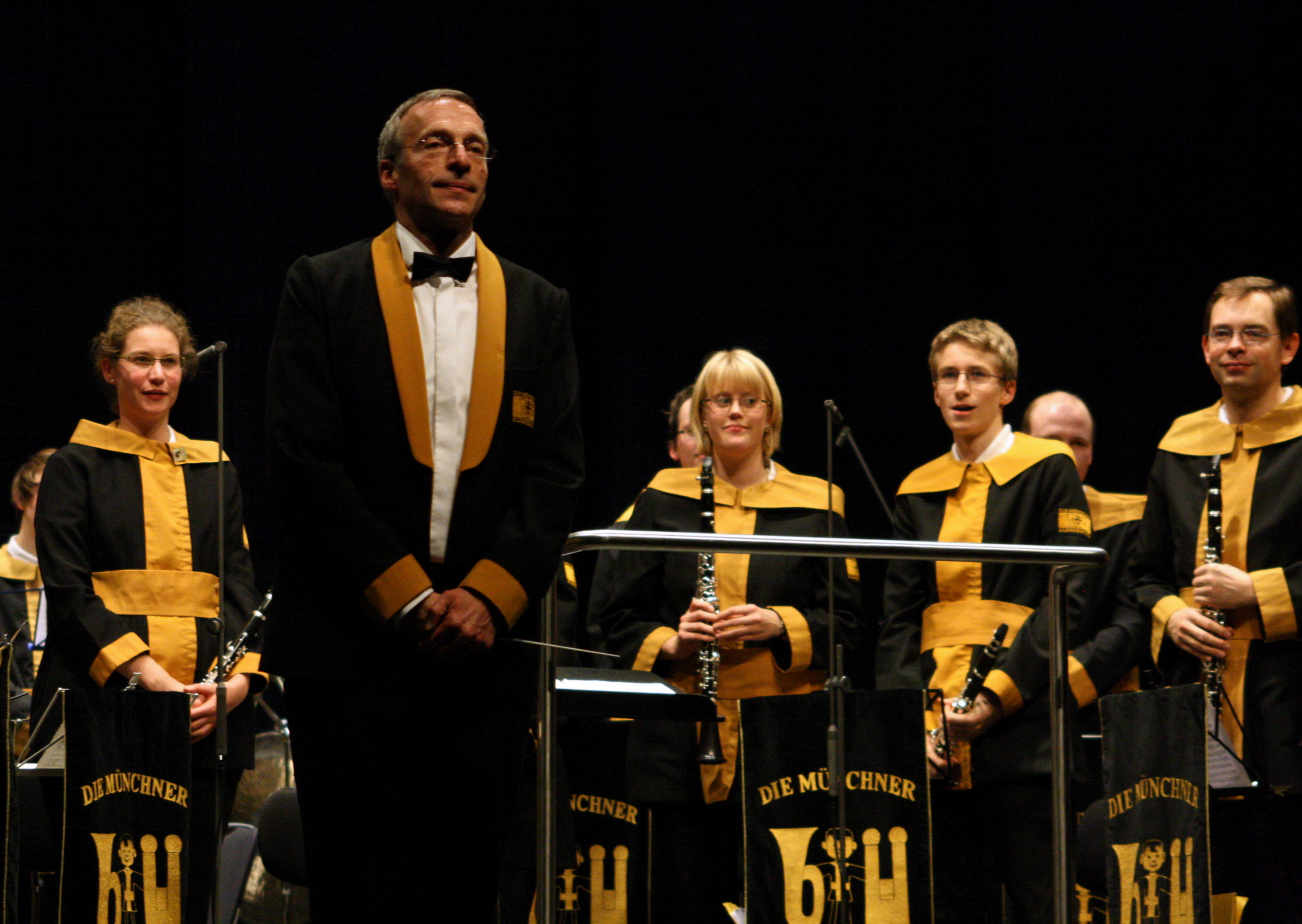 Die Münchner Bläserbuben mit ihrem Dirigenten Markus Fees beim Auftritt im Carl-Orff-Saal im Gasteig München. Konzert zu ihrem 50jährigen Bestehen.